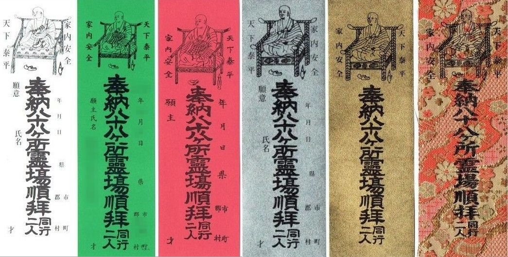 八十八箇所の納め札